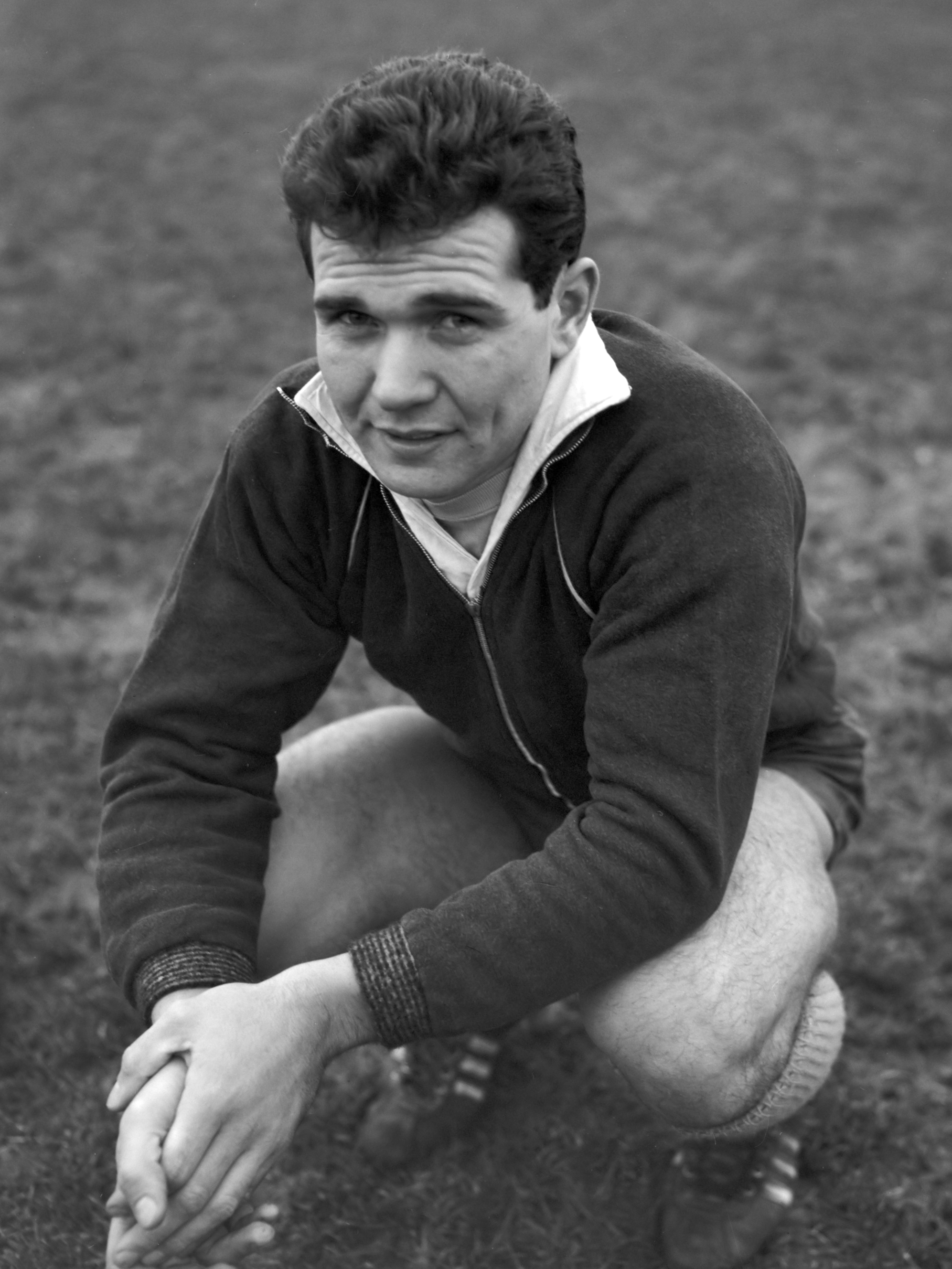 Piet Lagarde 28 november 1961